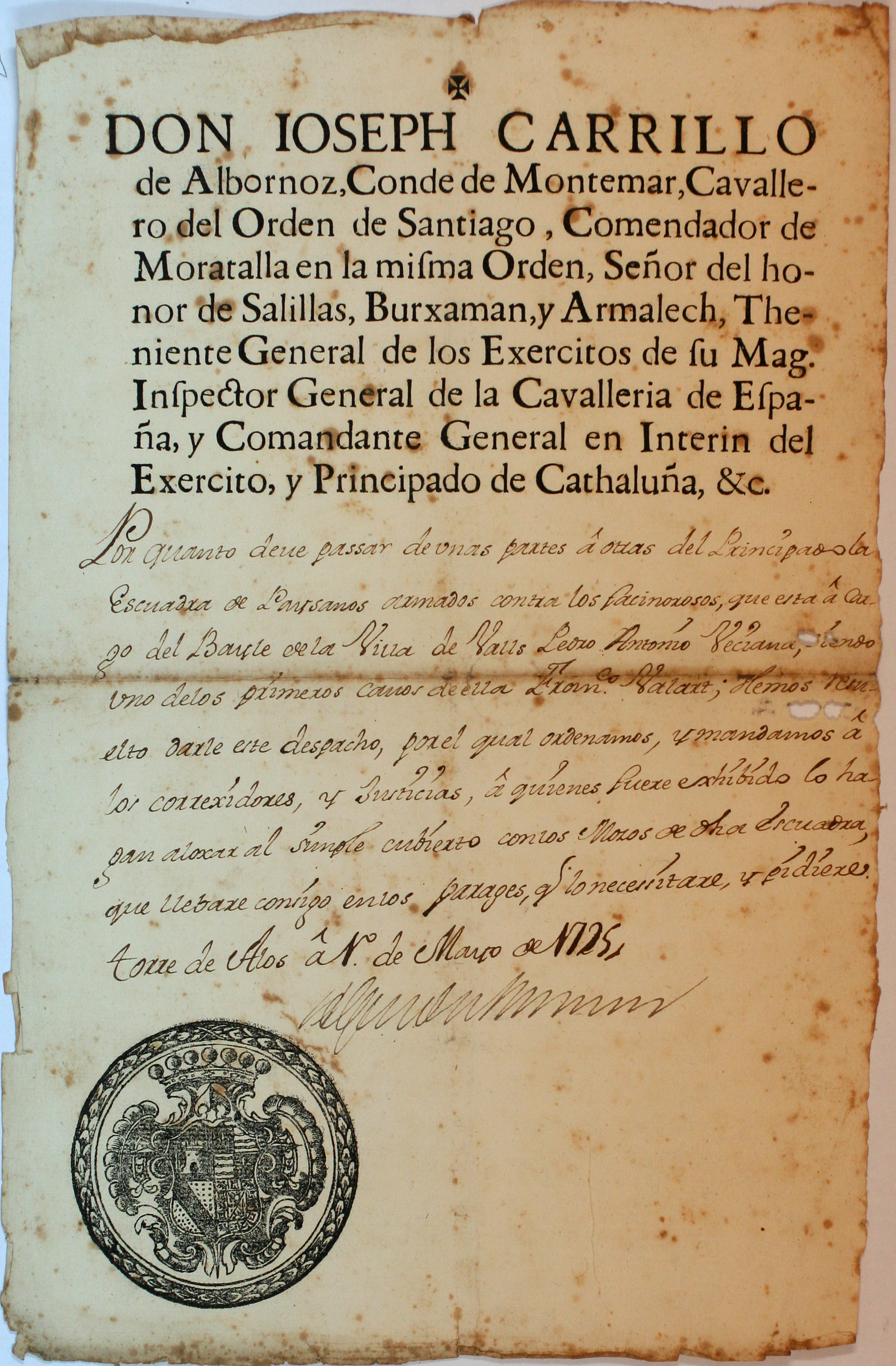 Títol: Josep Carrillo, comte de Montemar i comandant general interí del Principat de Catalunya, ordena a corregidors i justícies que allotgin els mossos de l'esquadra de paisans del batlle de Valls, Pere Anton Veciana Data: 1 de maig de 1725 Suport material: Paper Mides: 200 x 313 mm